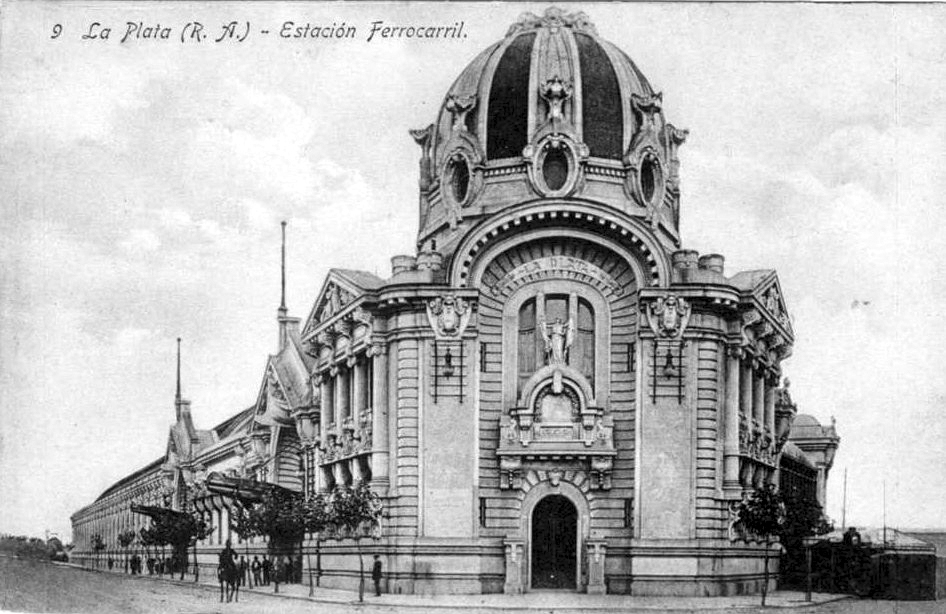 Postal enviada en 1927, que muestra el edificio de la Estación La Plata del Ferrocarril del Sud (hoy Ferrocarril Roca), inaugurada en 1906.